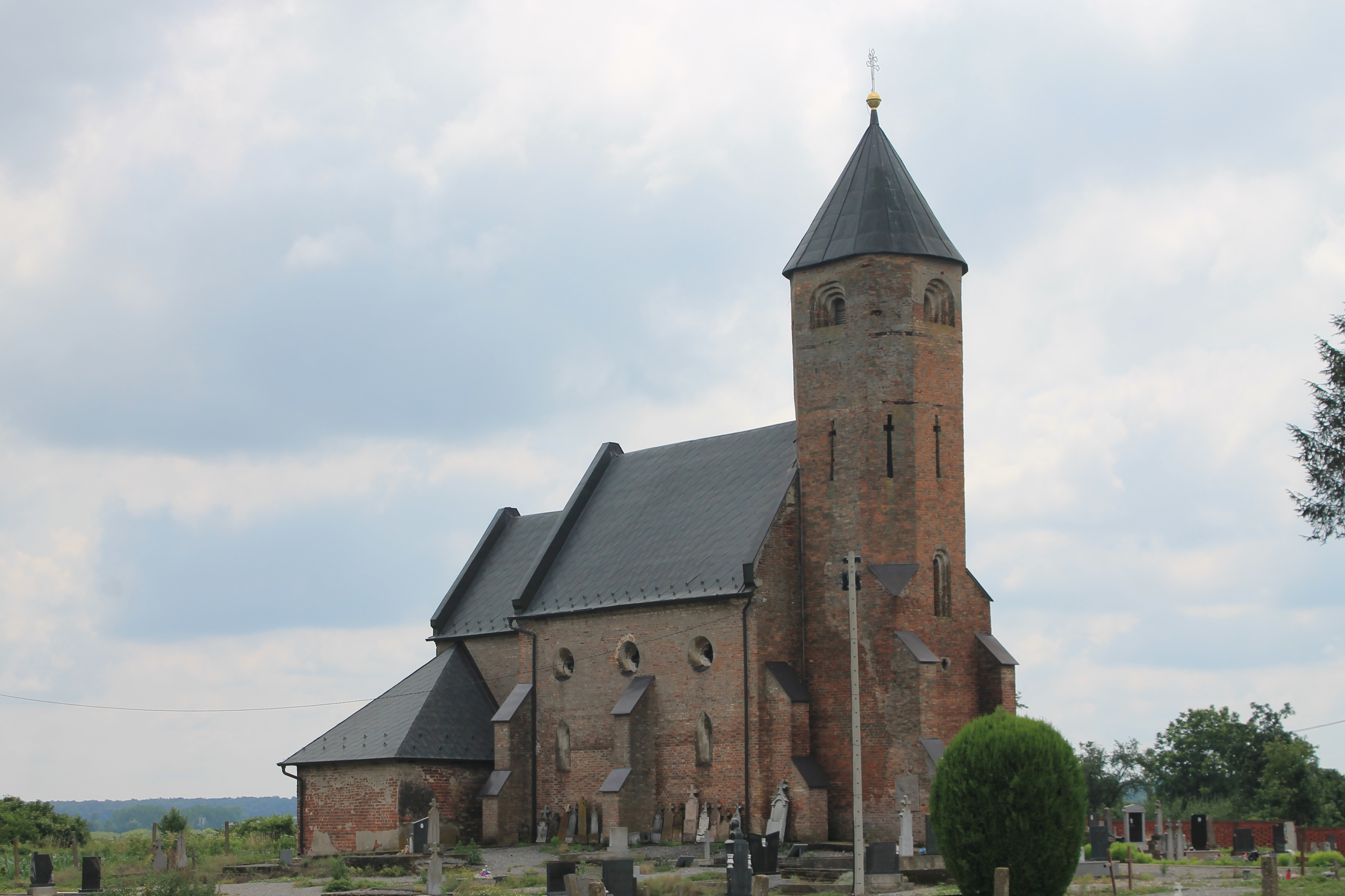 Rimokatolička crkva. Светиште Марије помоћнице кршћана и душа у чистилишту